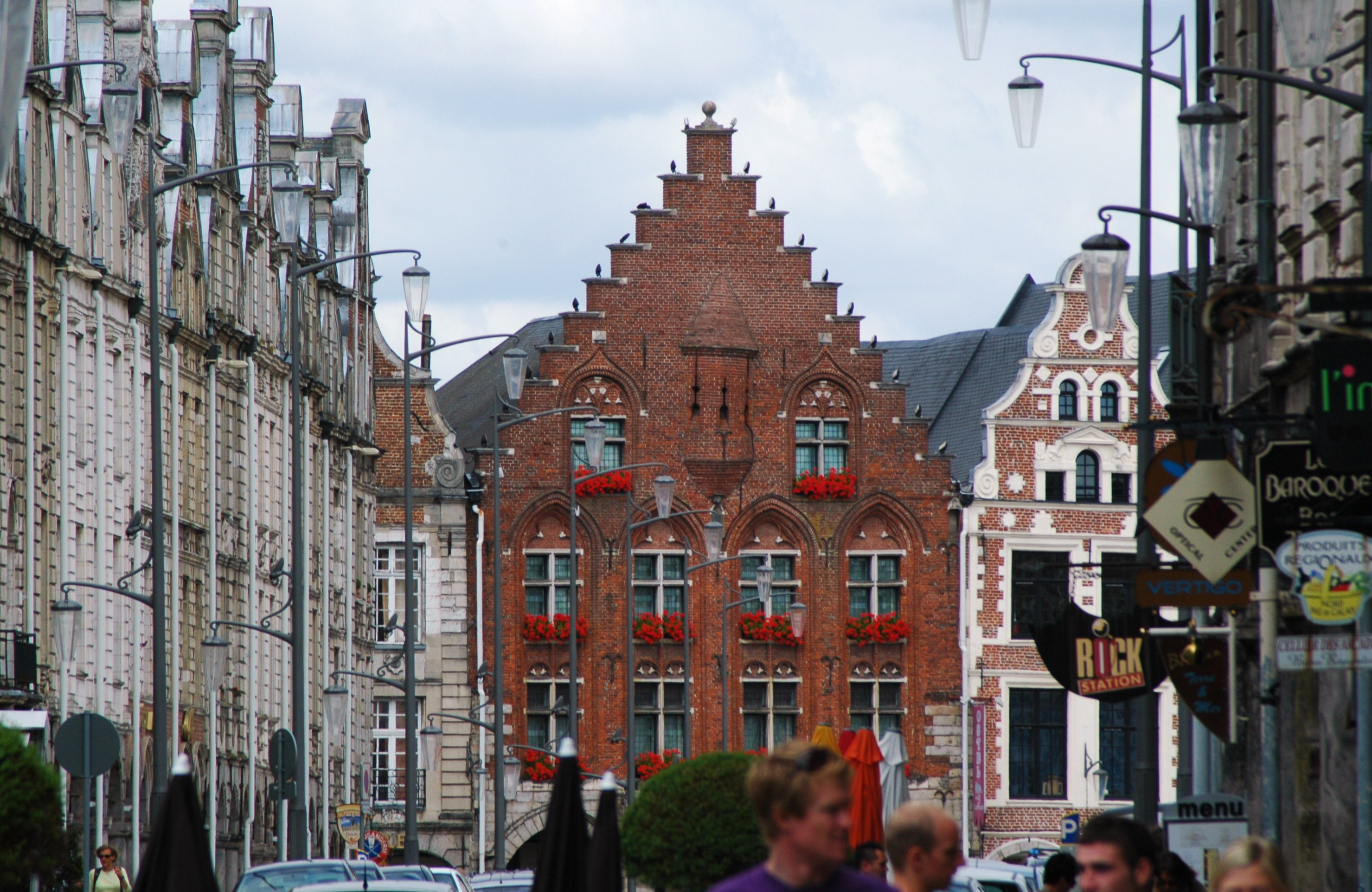 Arras (Pas-de-Calais, France). Façades à l'angle de la Grand'Place.